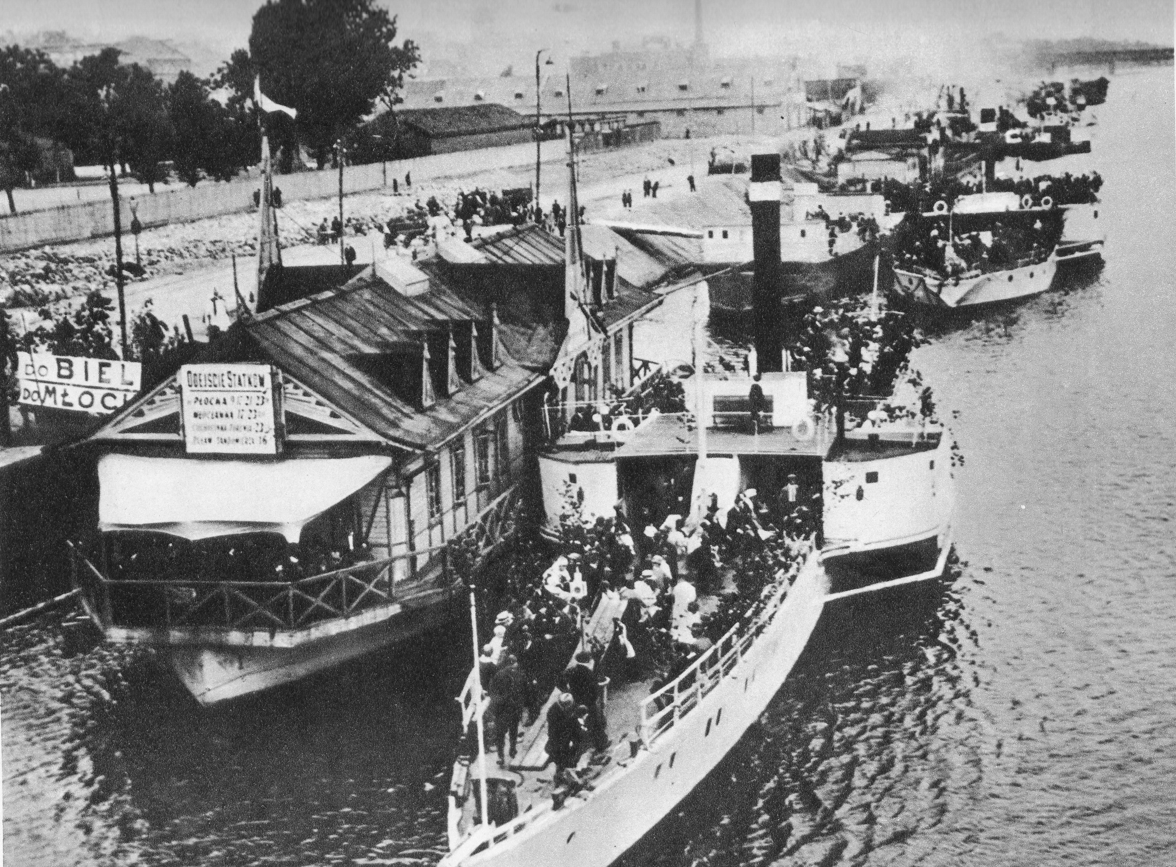 Przystań na Wiśle w Warszawie w okresie międzywojennym